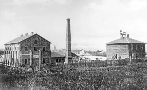 Figur 1. Aarhus Palmekærnefabrik fra 1875